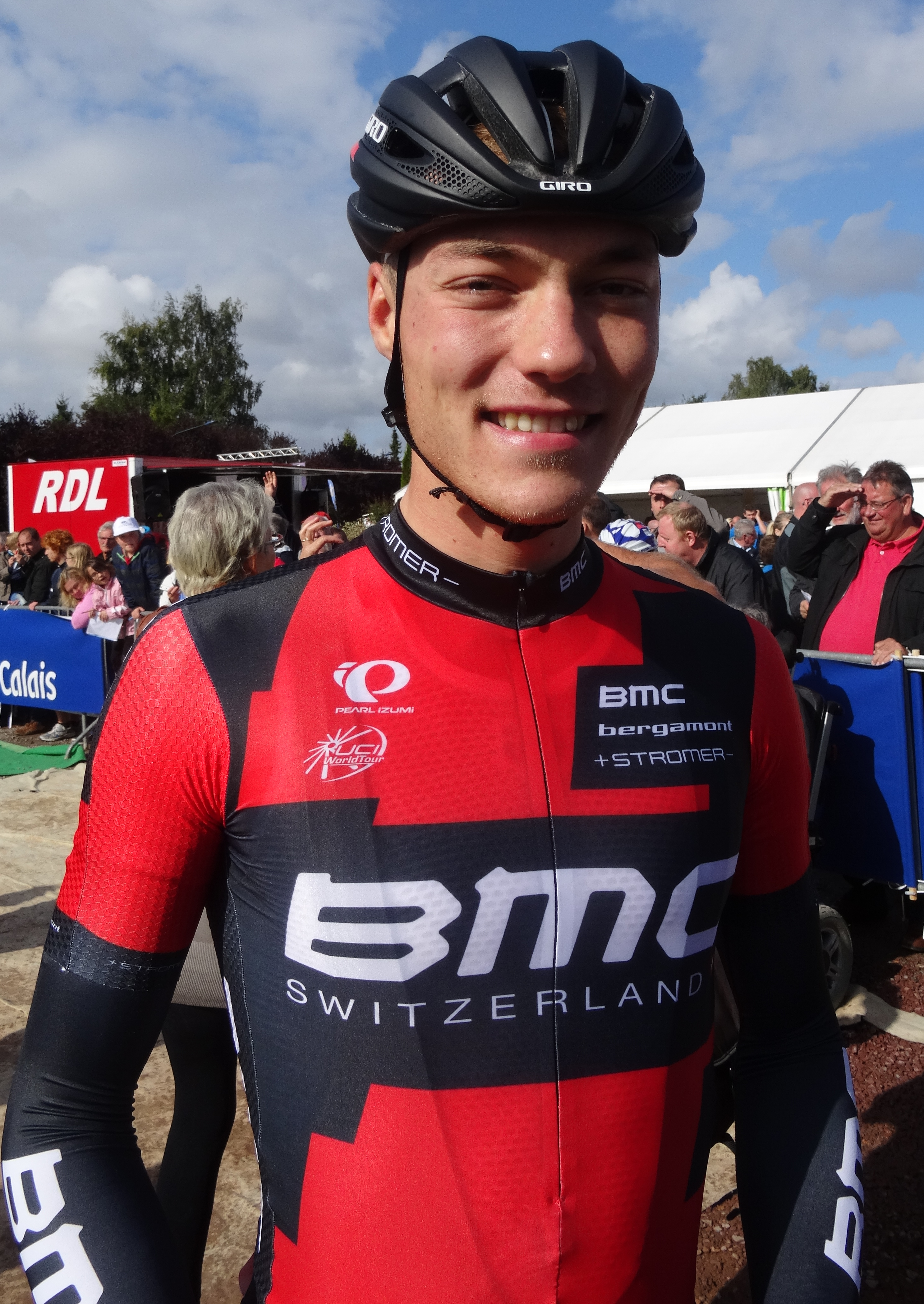 Reportage réalisé le dimanche 21 septembre à l'occasion du départ et de l'arrivée du Grand Prix d'Isbergues 2014 à Isbergues, Nord-Pas-de-Calais, France.